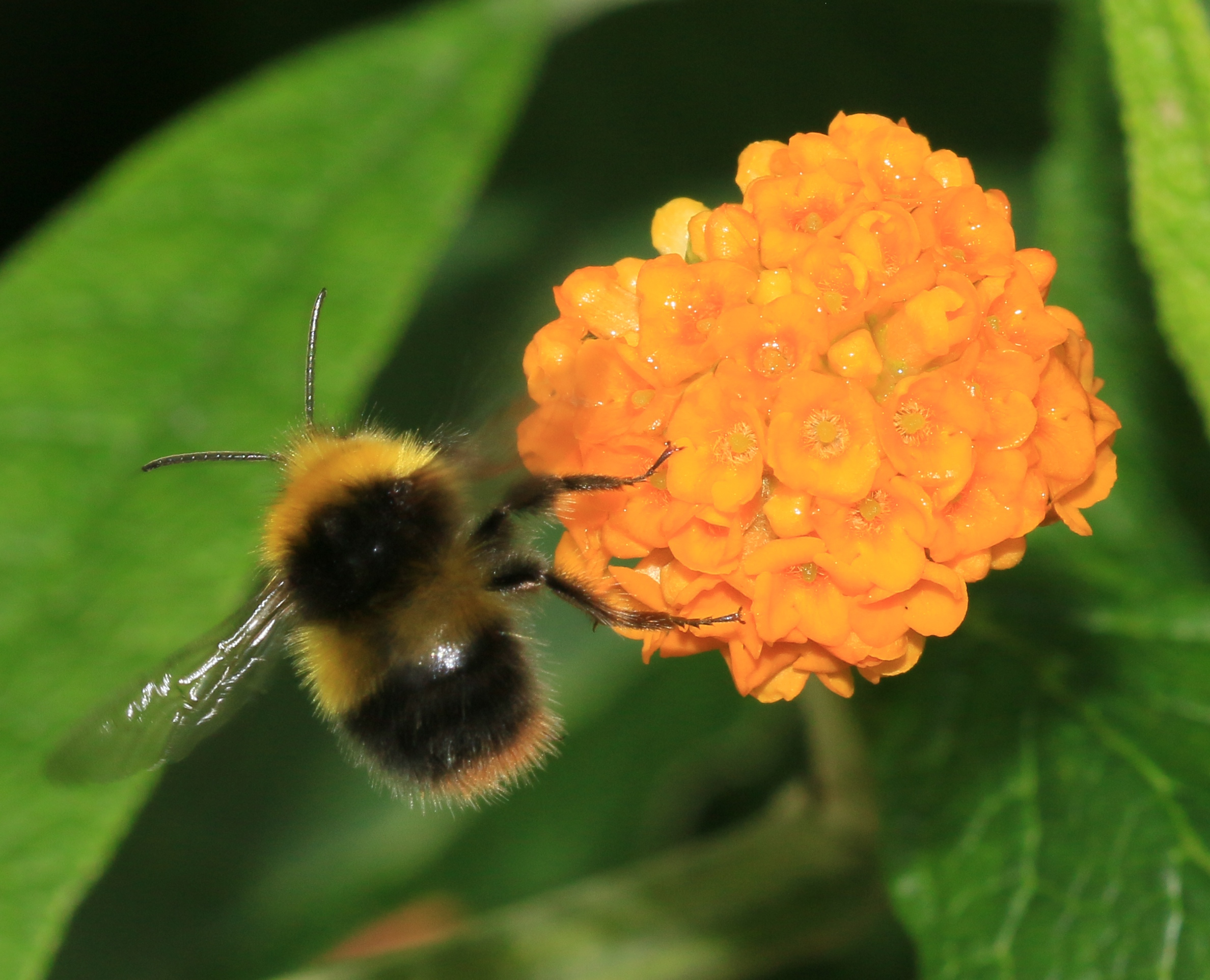 Garden safari